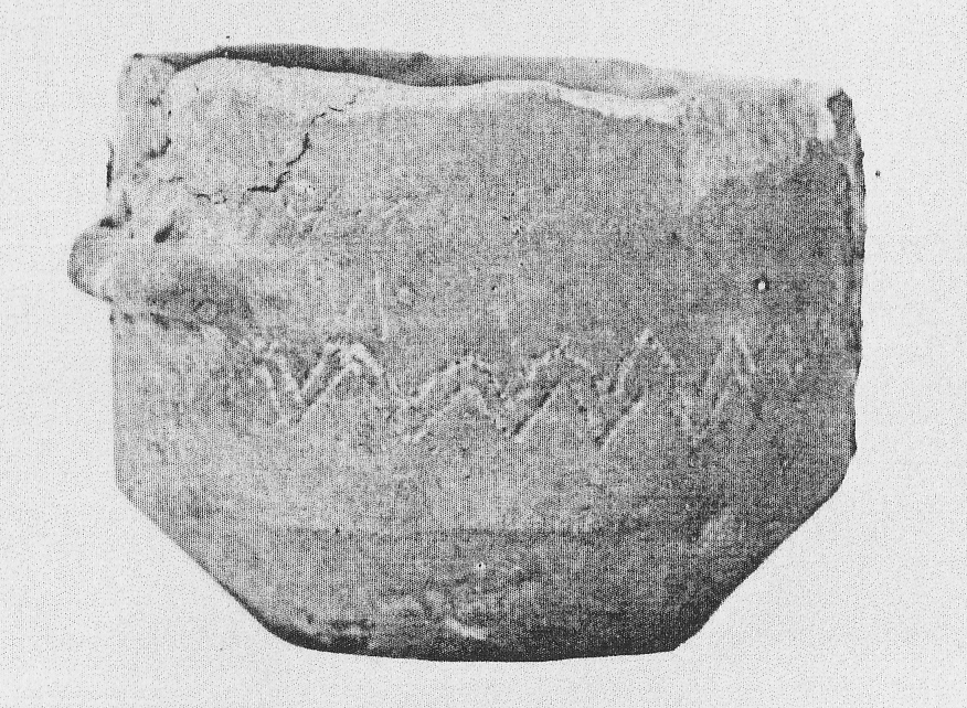 Gefäß aus dem Großsteingrab Osterode am Fallstein, heute im Harzmuseum in Wernigerode